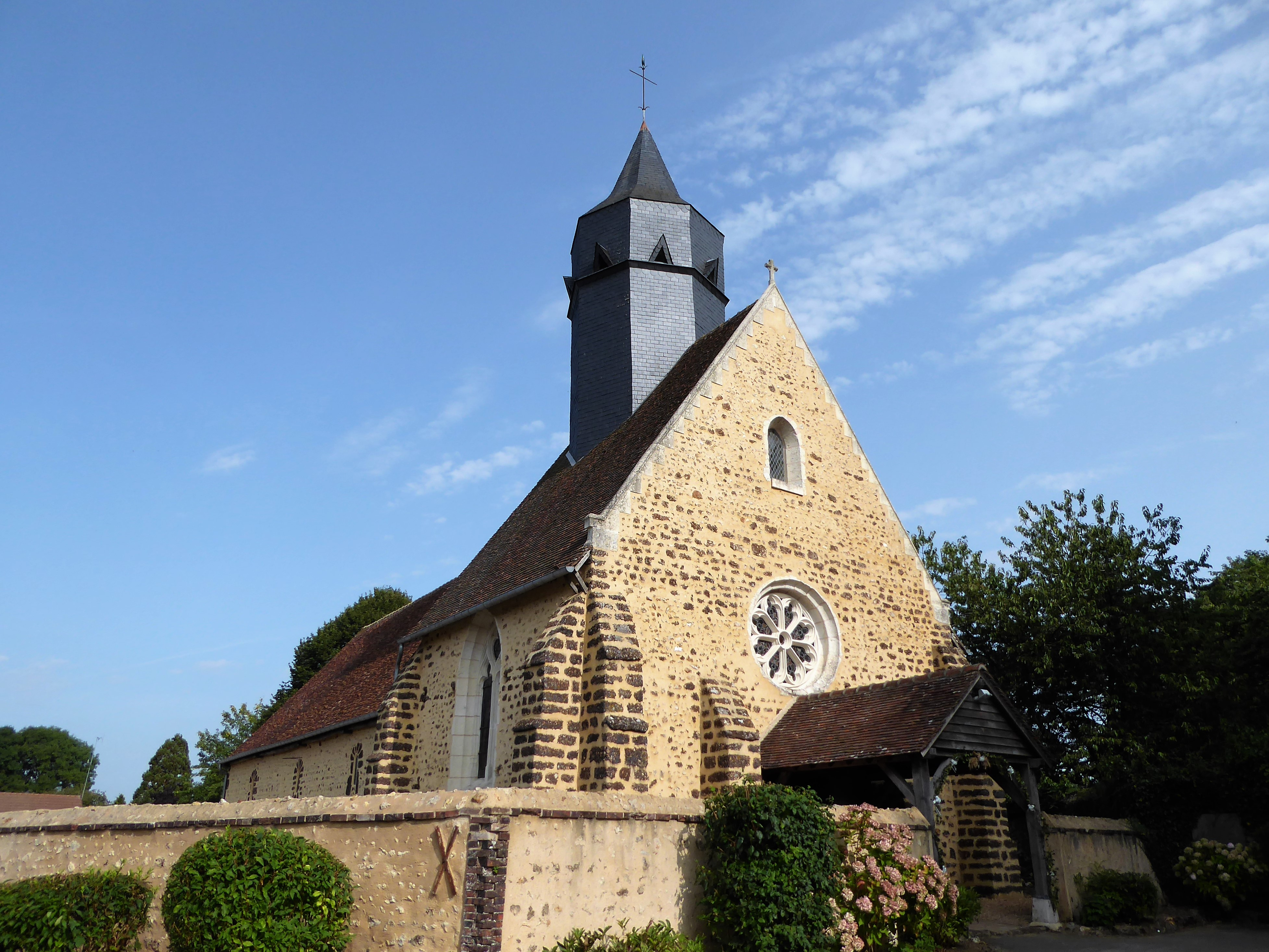 église Saint-Eustache-et-Saint-Fiacre, Le Thieulin, Eure-et-Loir, France.